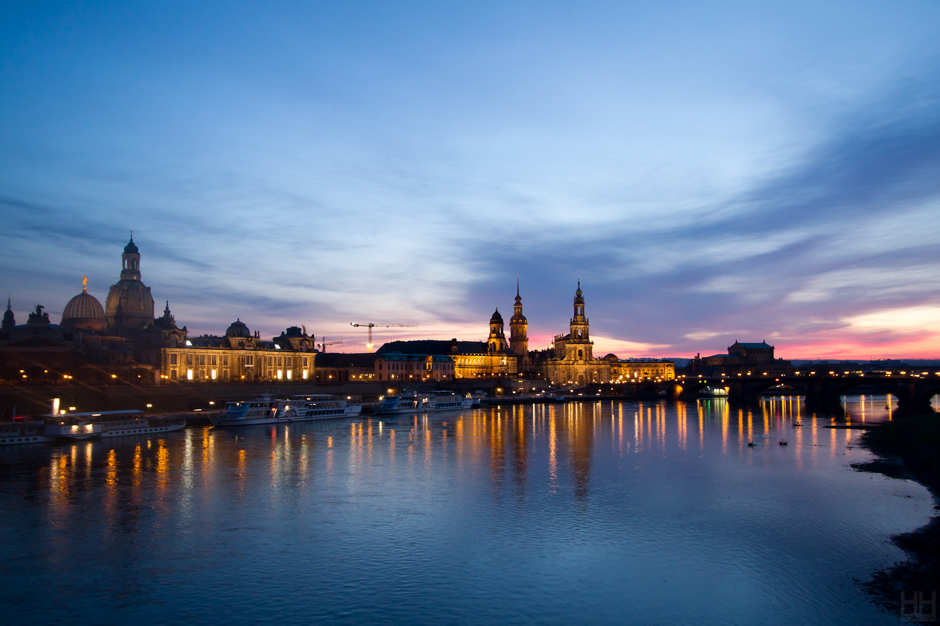 Dresden Altstadt